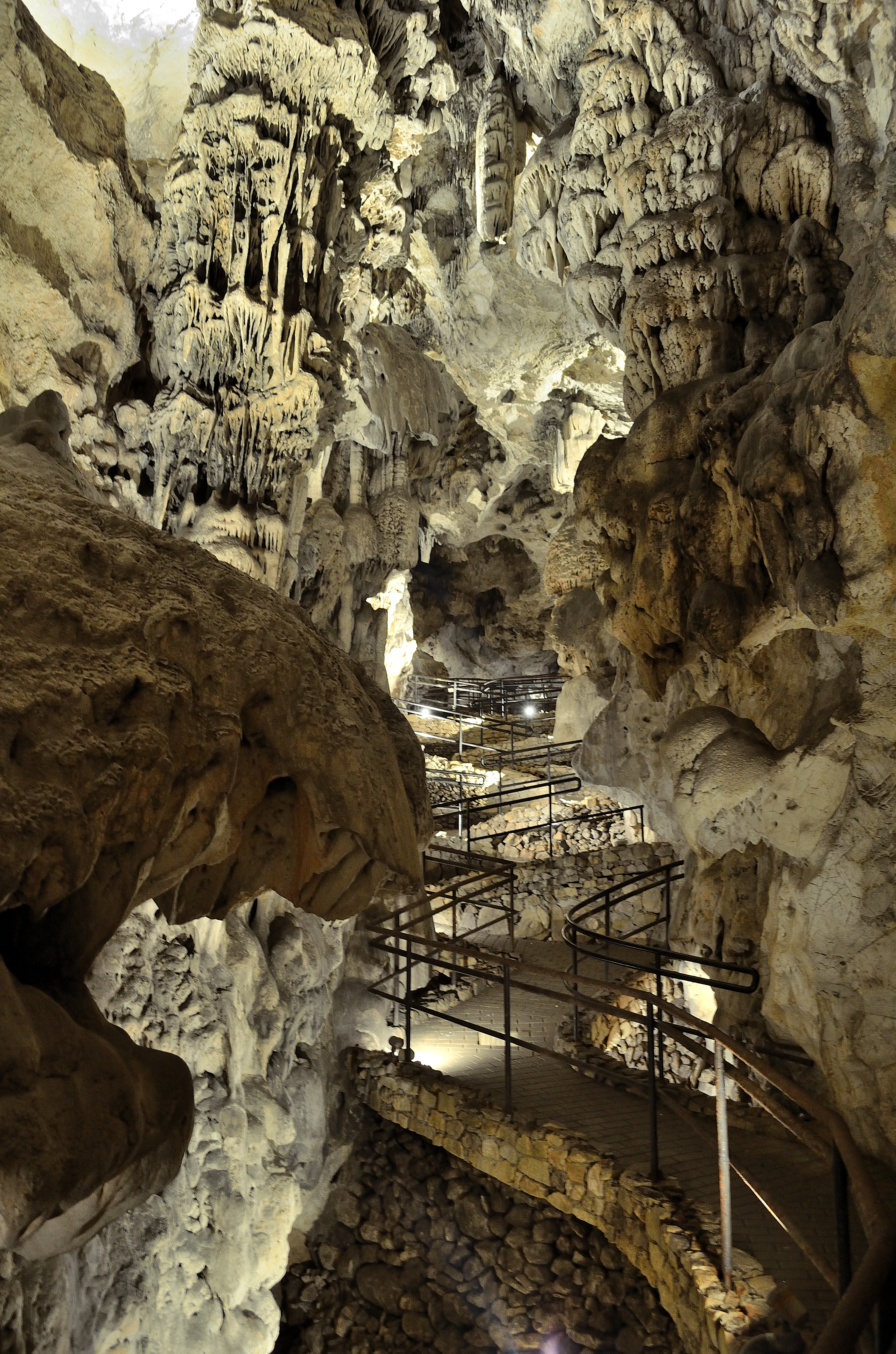 Cuevas de las Ventanas